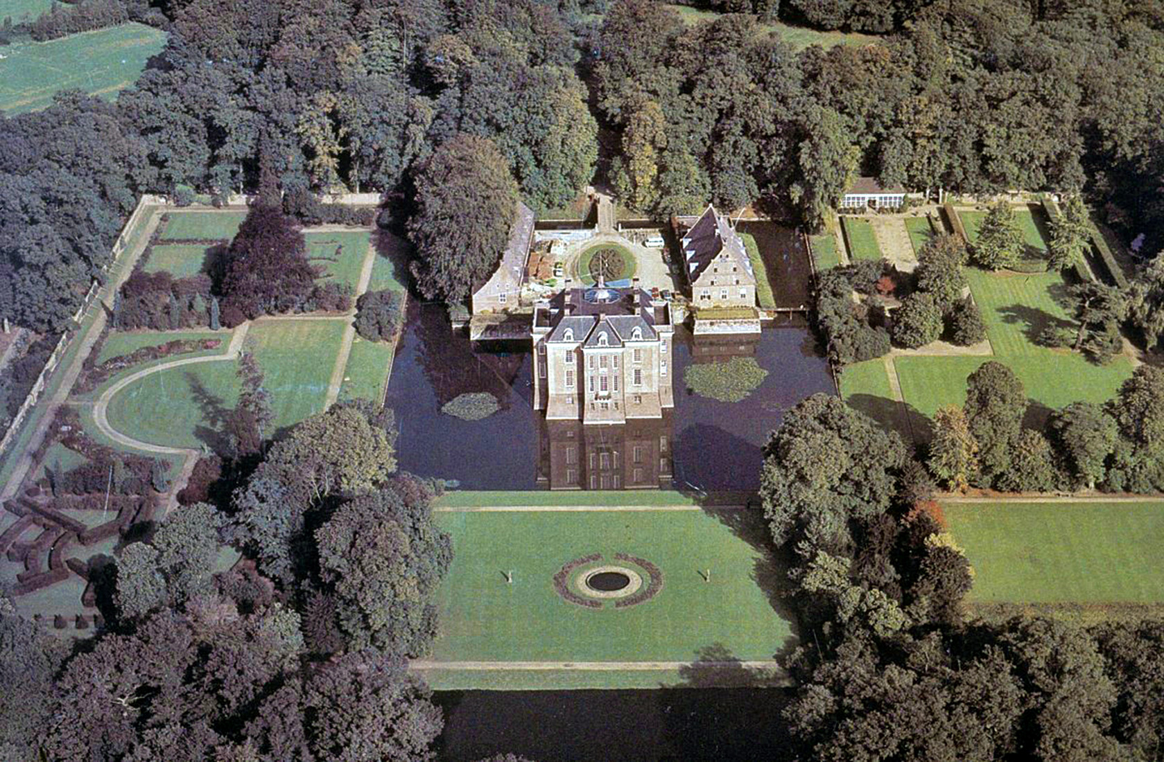 KASTEEL MIDDACHTEN: Exterieur OVERZICHT VANUIT DE LUCHT